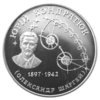 Ювілейна монета "Юрій Кондратюк"